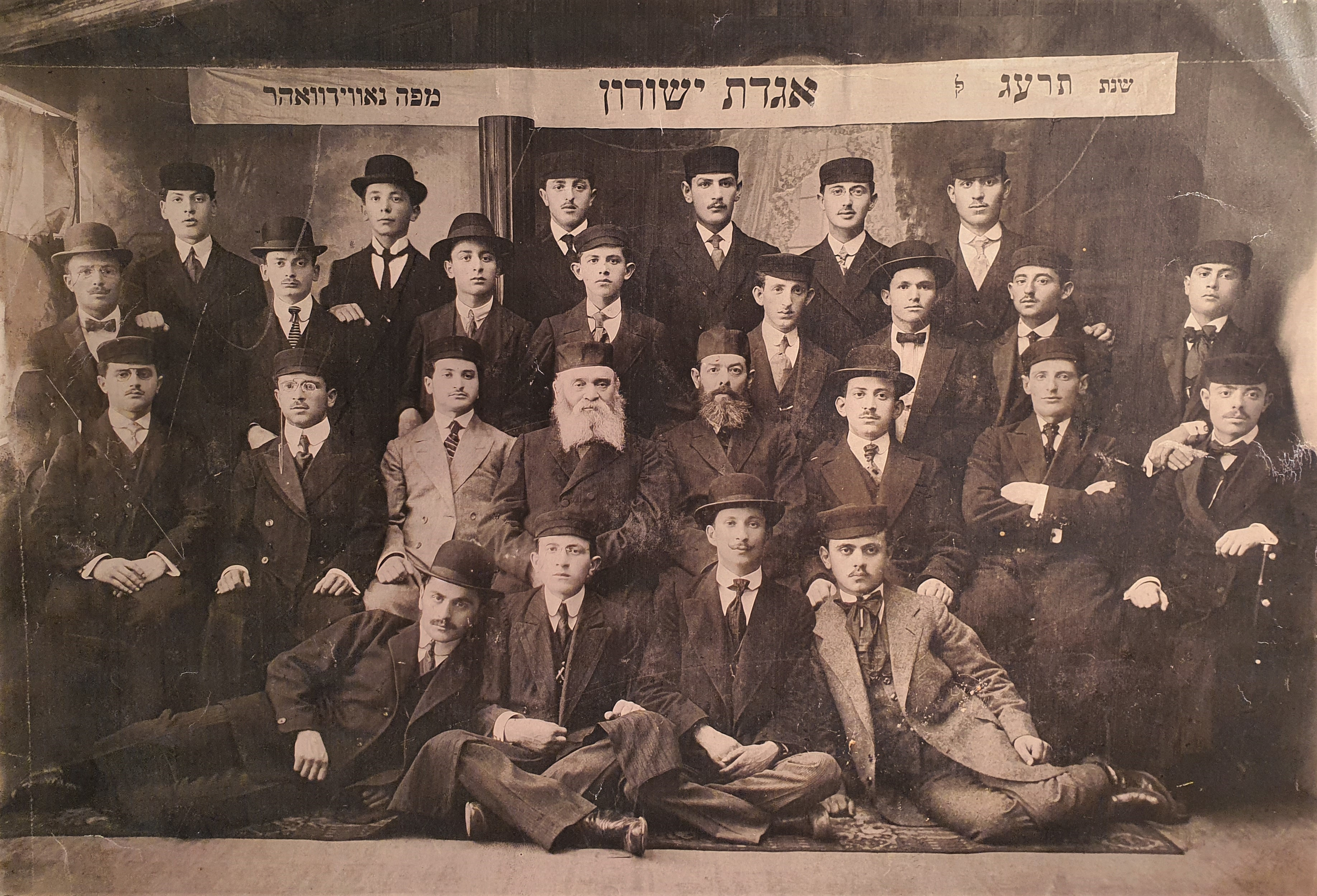 יצחק אייזיק בן-טובים ותלמידיו, "אגודת ישורון", נובידבור פולין, 1913